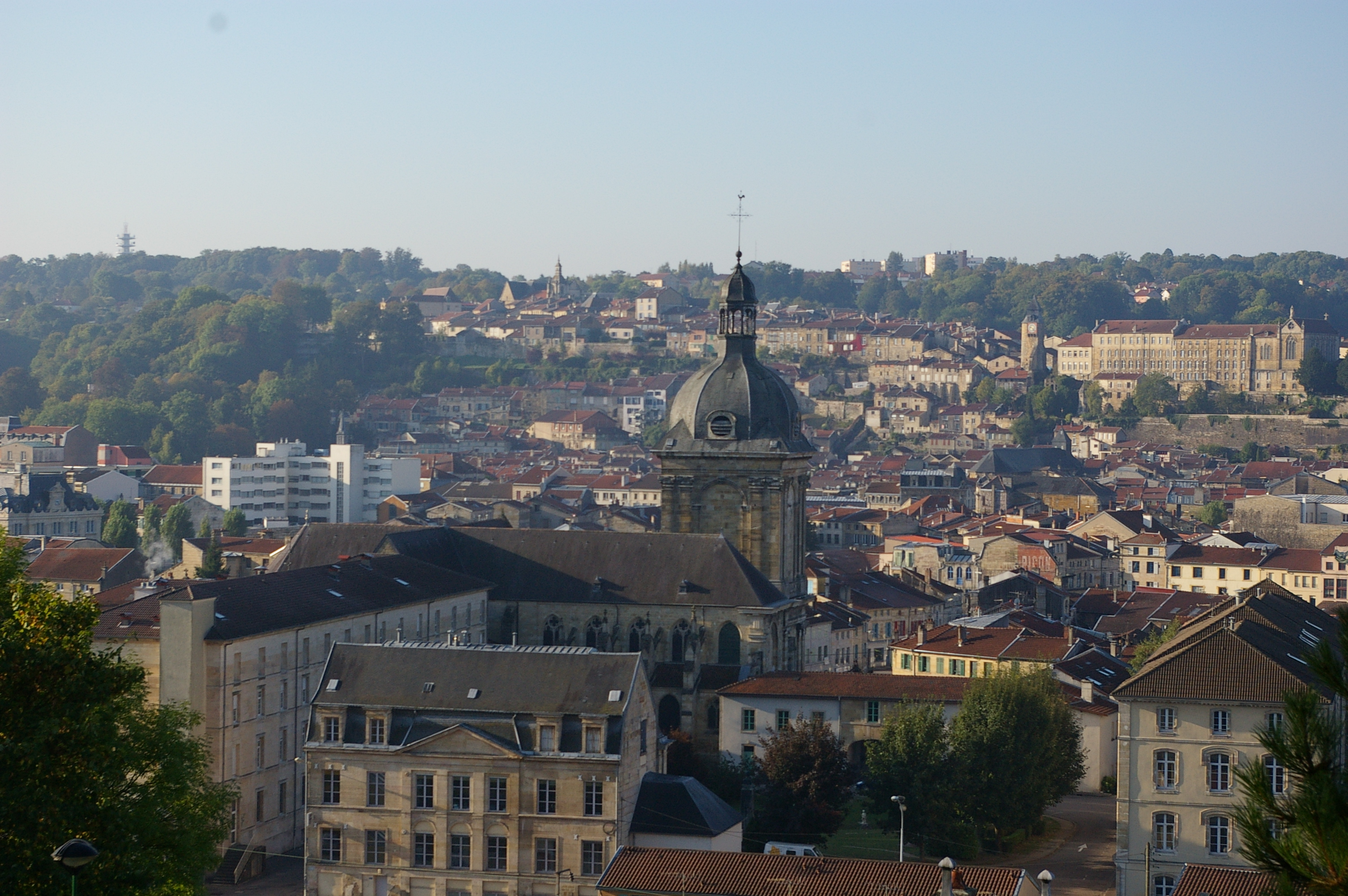 Vue depuis la Côte Sainte Catherine